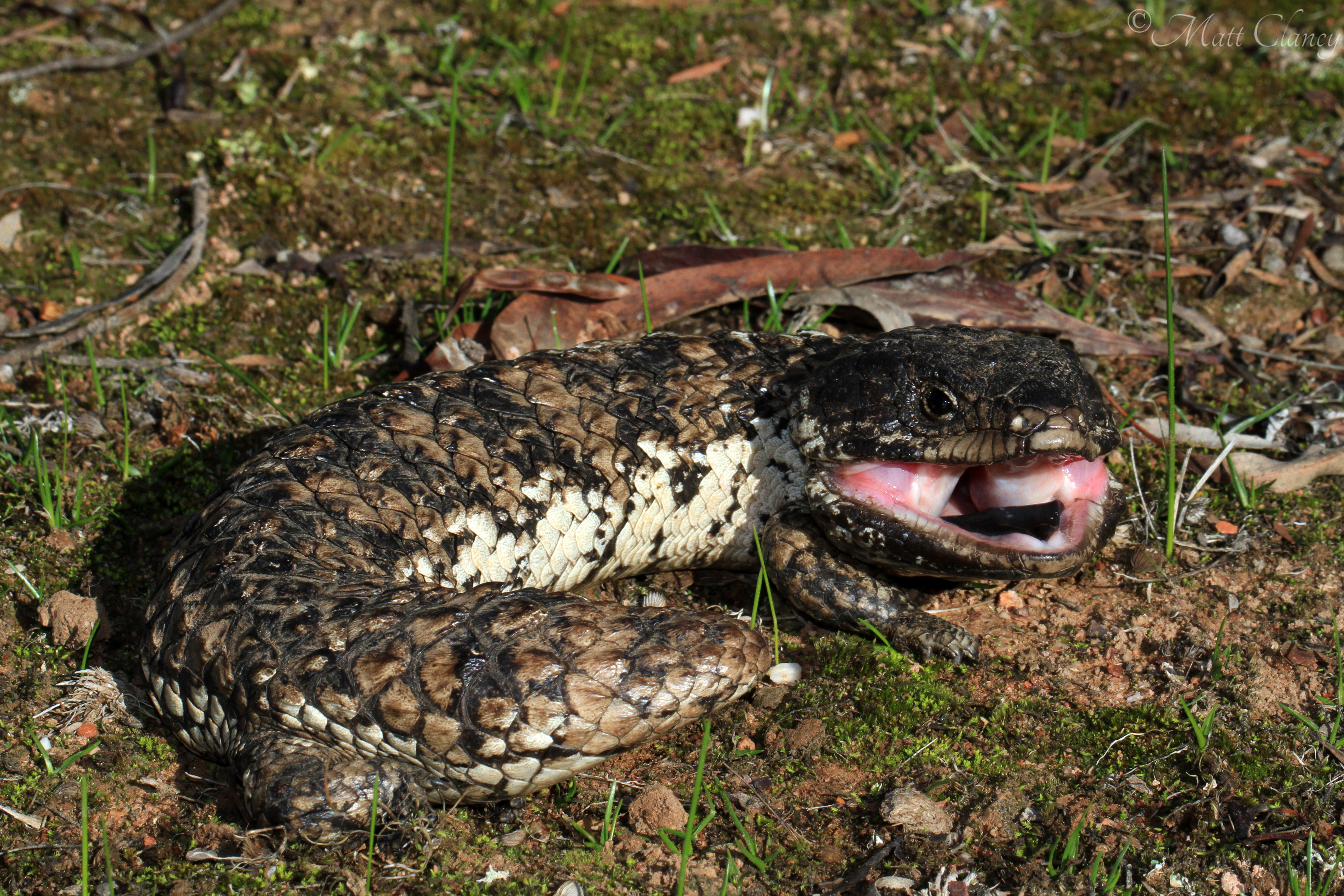 Bendigo district, Vic.